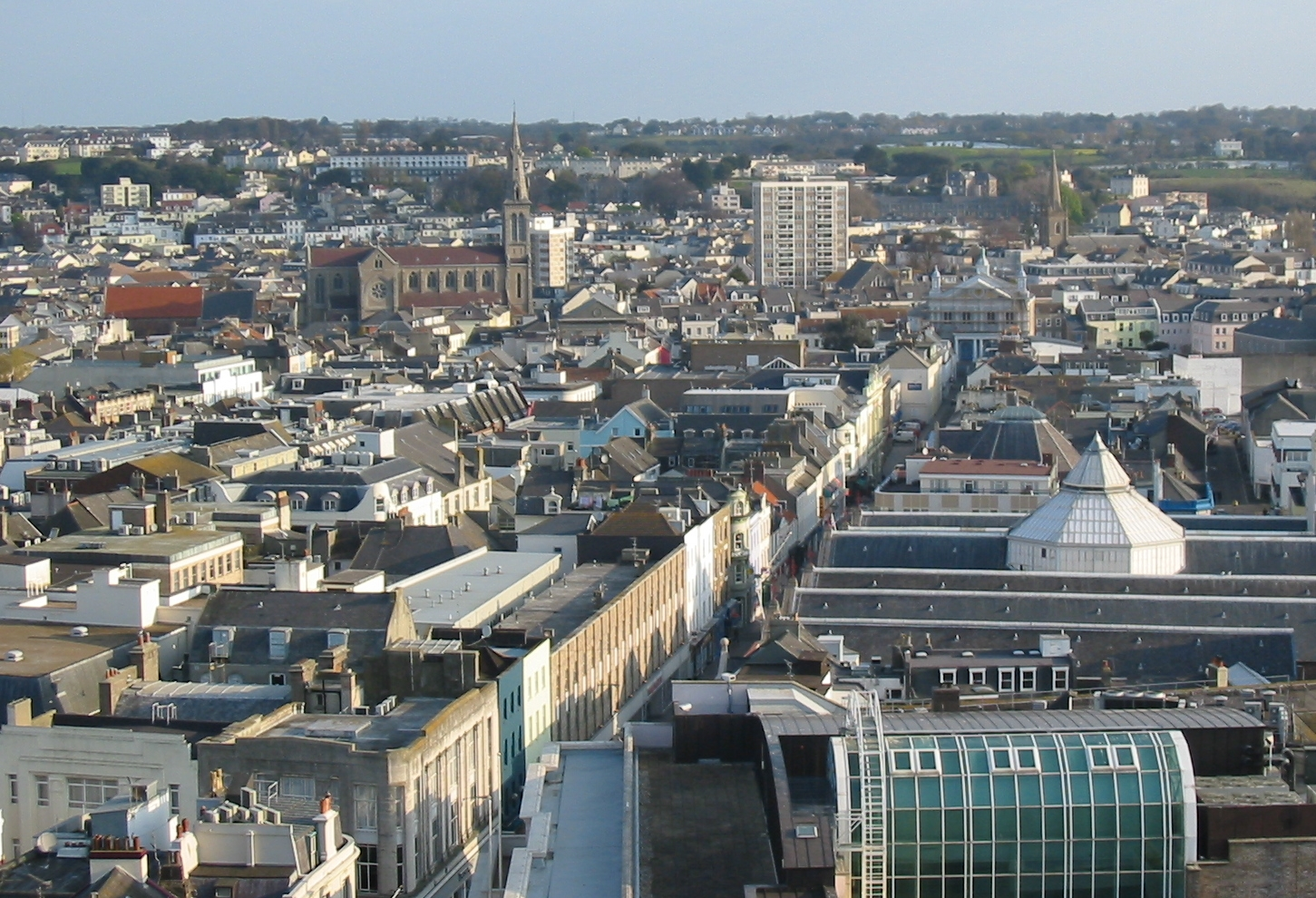 Nrf: Saint Hélyi, Jèrri